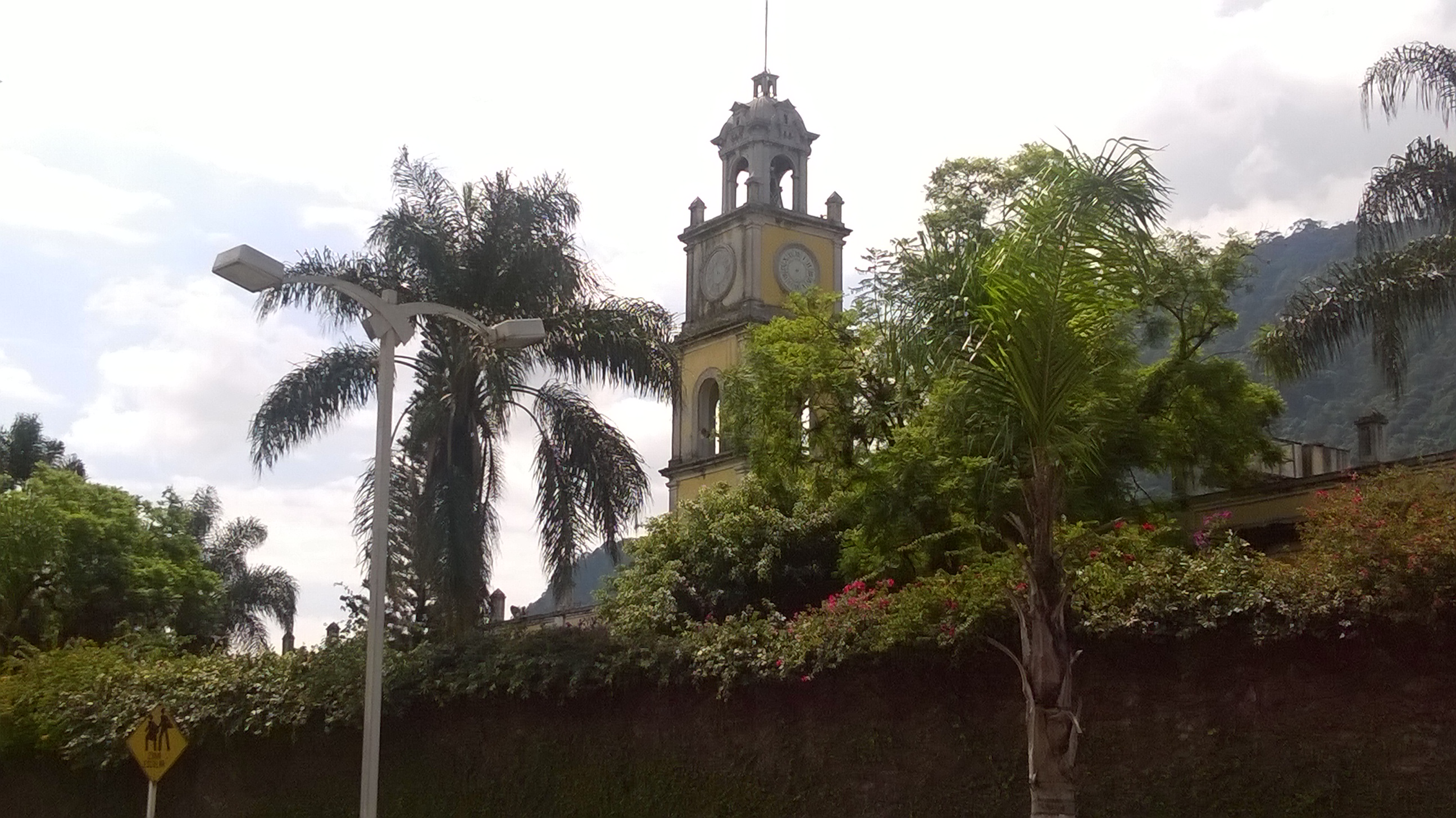 Exfábrica de Río Blanco, Veracruz